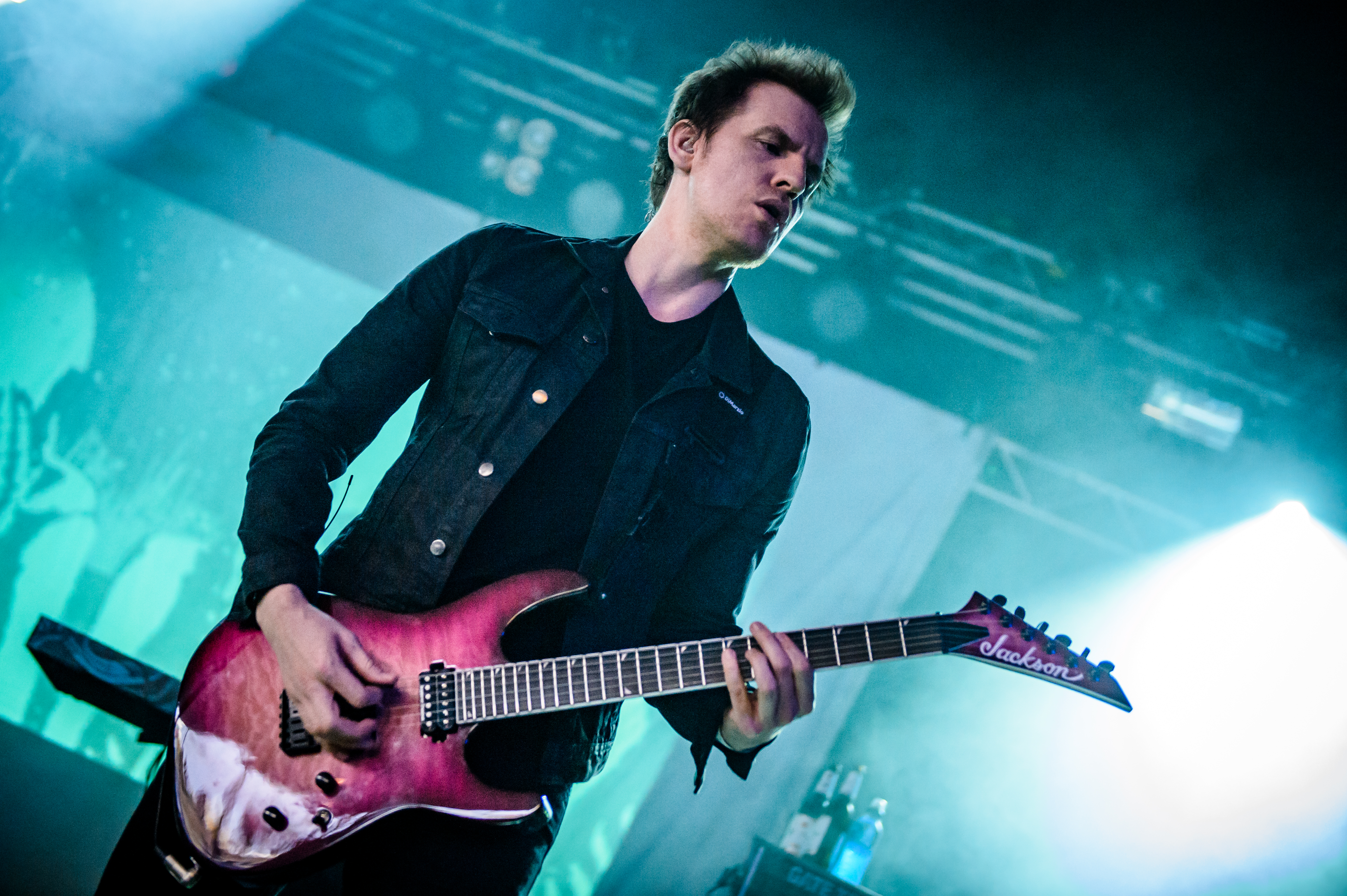 'Dong Open Air 2017; Neukirchen-Vluyn': 'Dark Tranquillity'